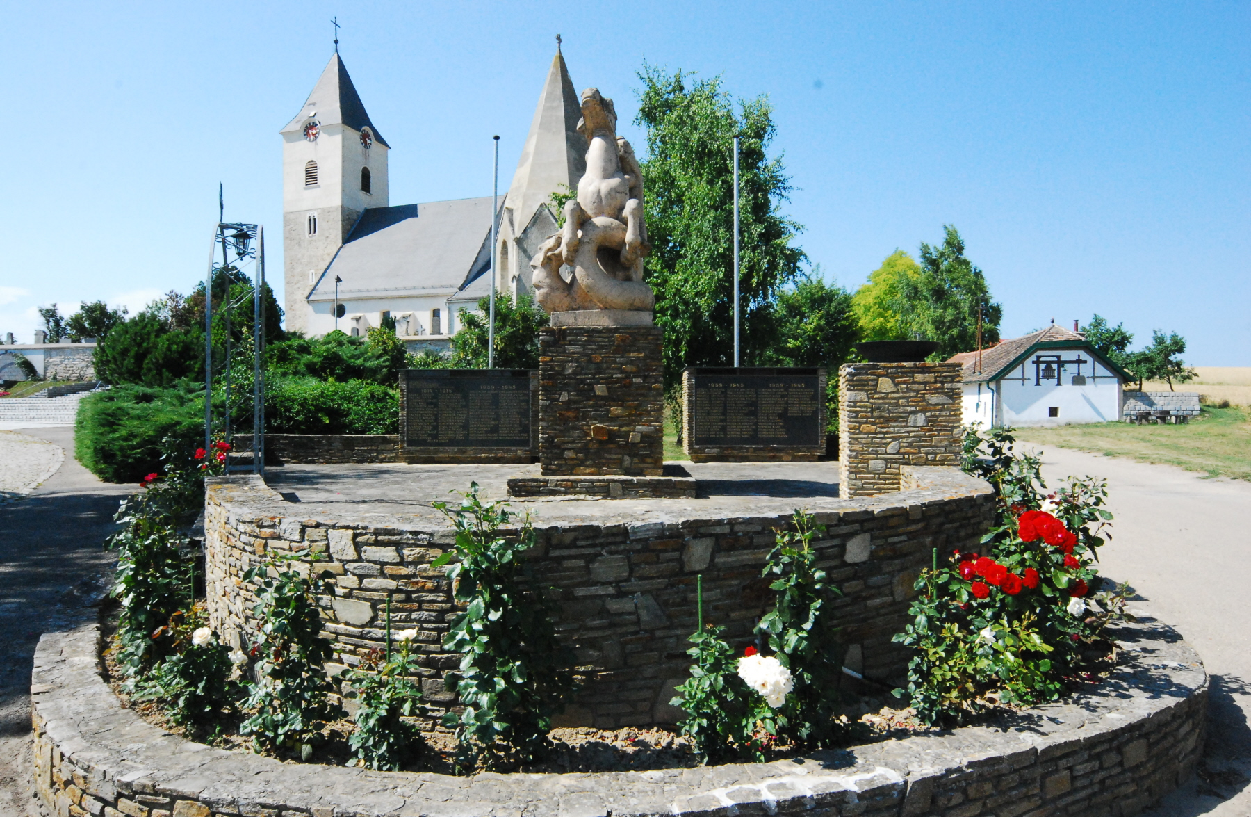 Kriegerdenkmal bei der Pfarrkirche von Zellerndorf in Niederösterreich